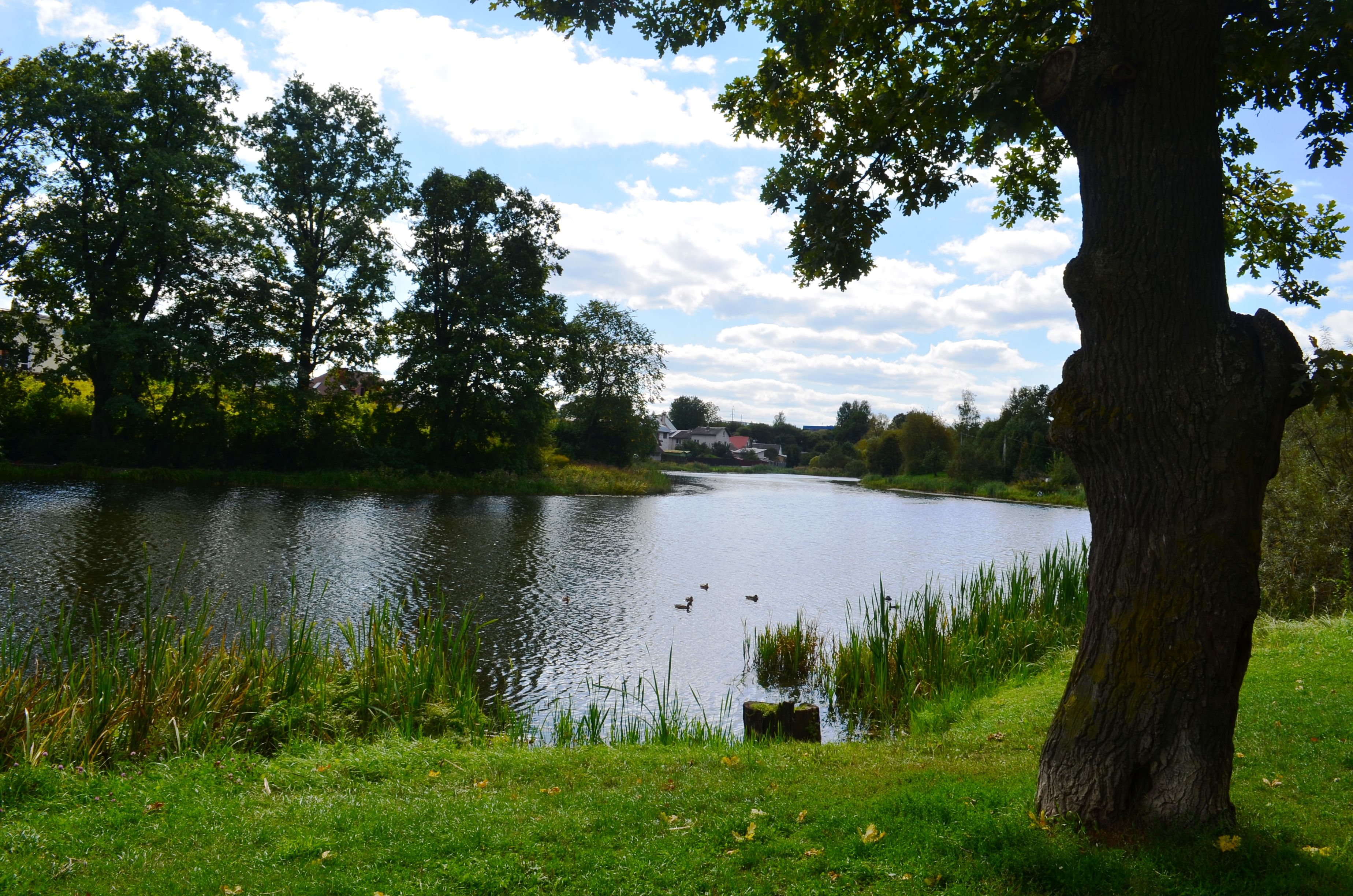 Cedrono tvenkinys, Baltupiai, Vilnius